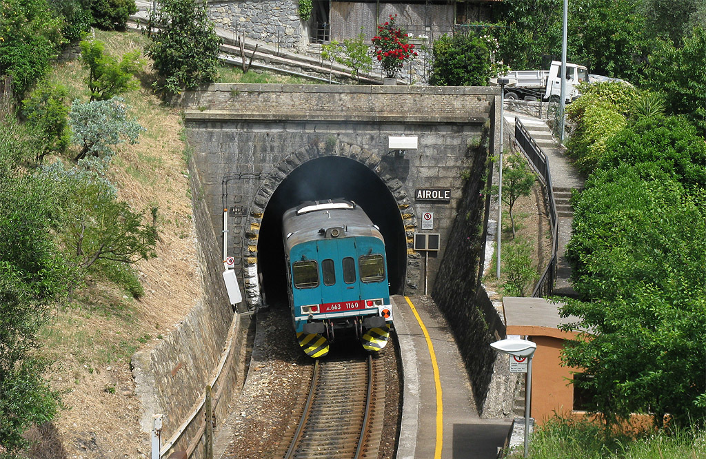 Vista della fermata di Airole con l'automotrice ALn 663.1160. La fermata, con la ricostruzione della linea nel 1979, è stata spostata in posizione molto più centrale rispetto al paese.